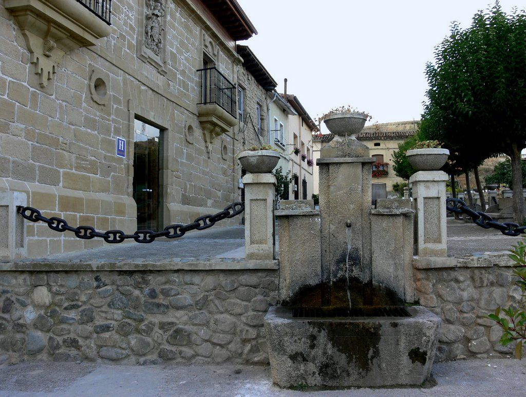 Villalobar de Rioja, municipio de La Rioja (España)